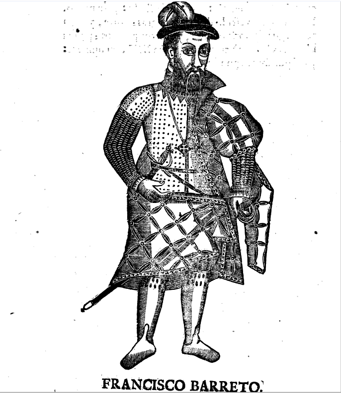 Francisco Barreto Gouverneur de l'Inde Portugaise